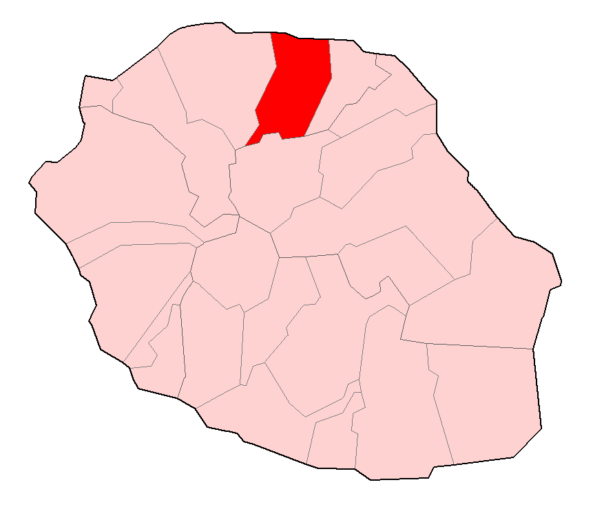 Carte de la Réunion permettant de localiser Sainte-Marie.